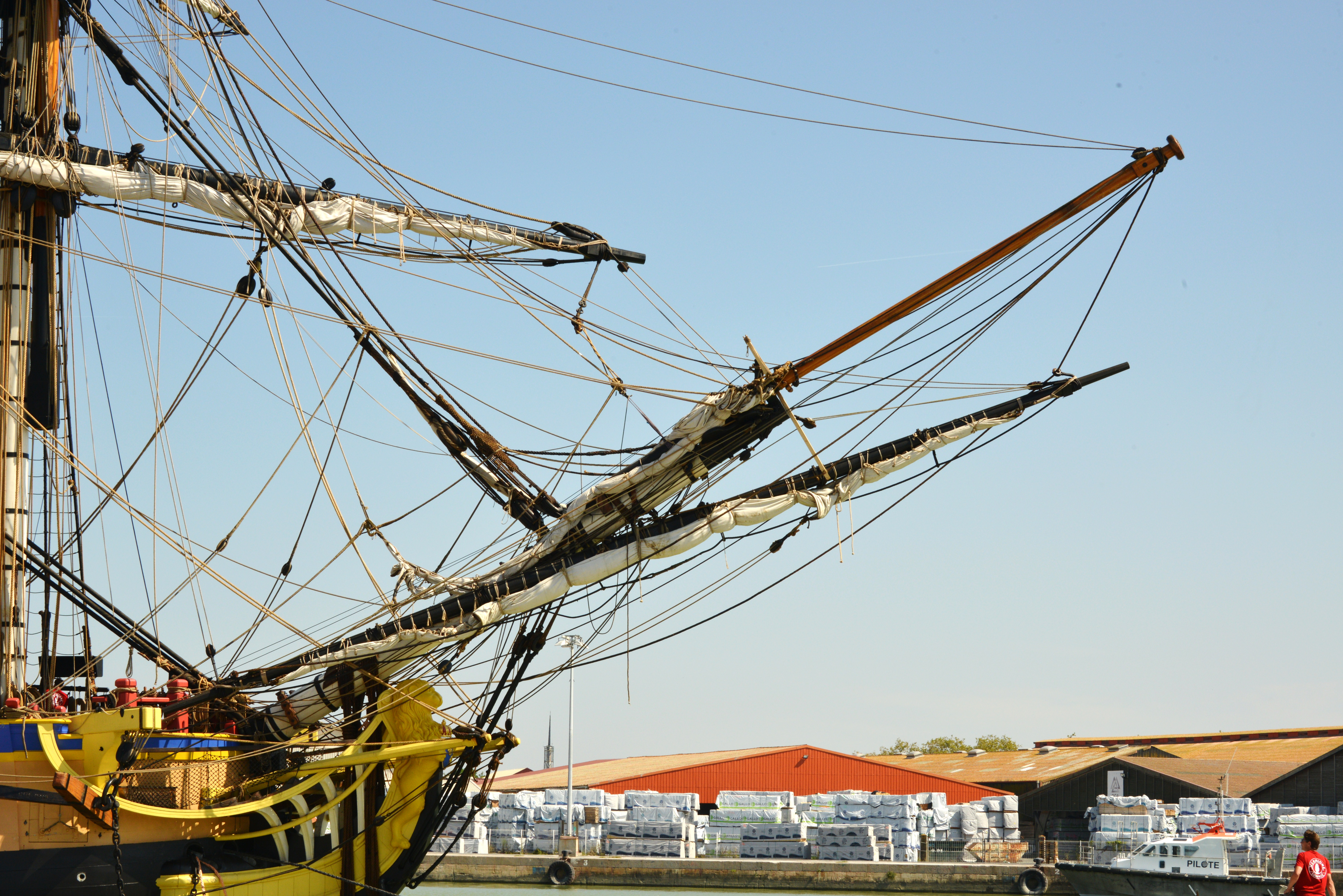 La frégate "L'Hermione" amarrée dans le port de commerce de Rochefort, avant sa première descente de la Charente vers la mer. Sur cette photographie, on peut distinguer le mât de beaupré, le bout-dehors de beaupré et la vergue de civadière. Rochefort-sur-Mer, Charente-Maritime, France.